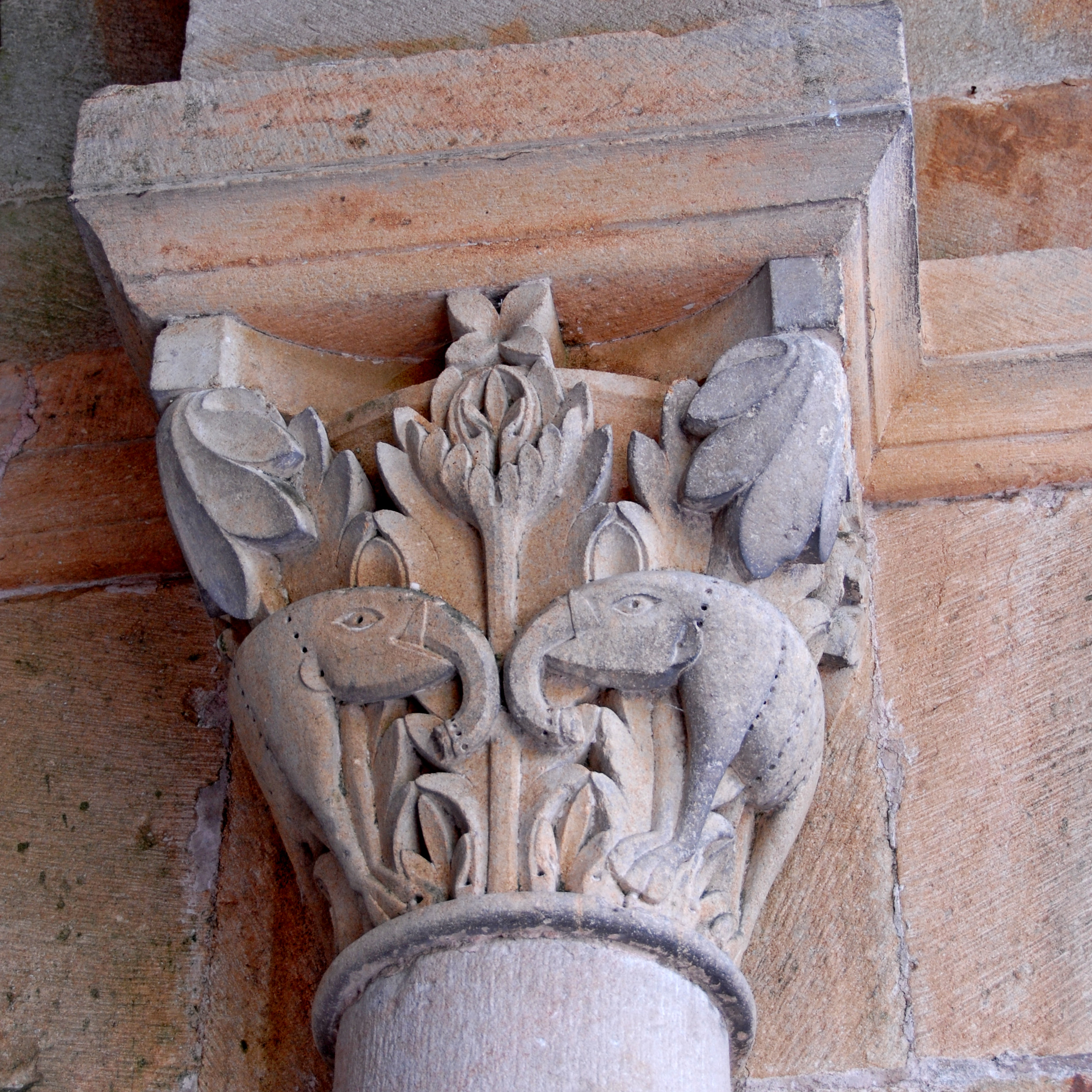 Portalvorbau, Elefantenkapitell